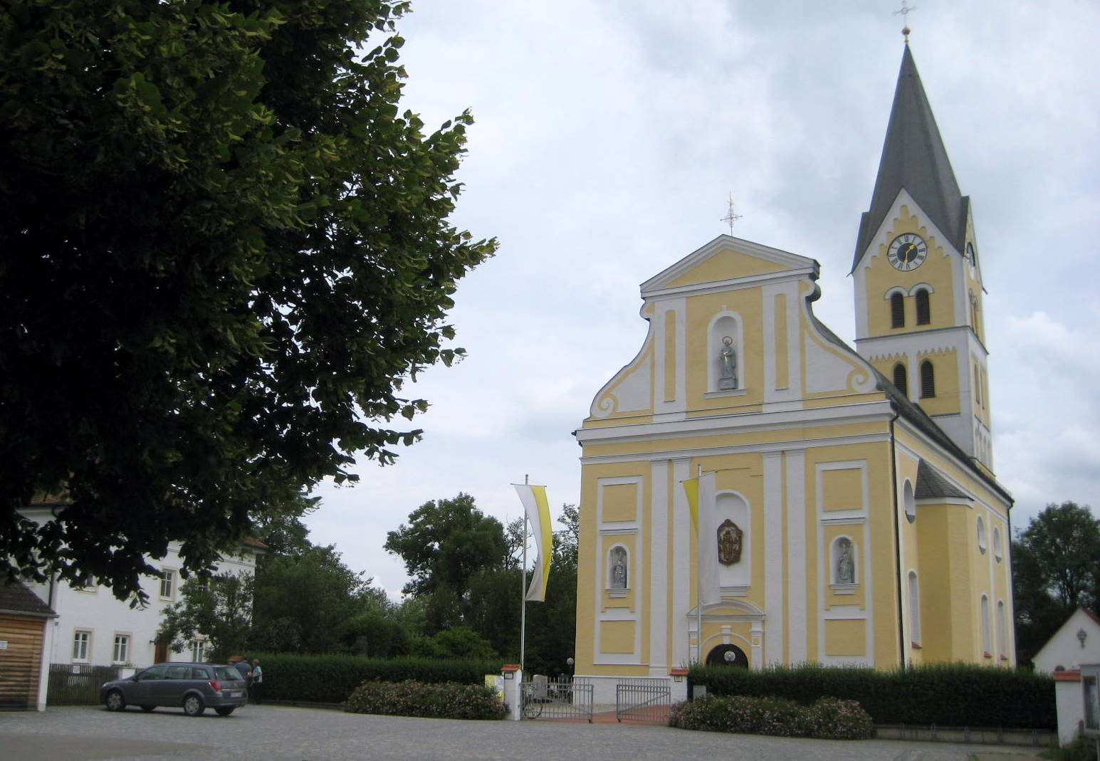 Das ist die Vorderansicht der Pfarrkirche St.Josef von Allershausen, Landkreis Freising, Bayern